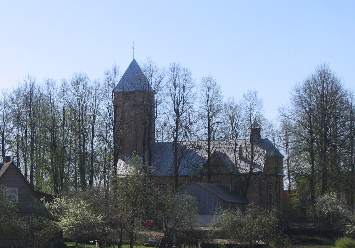 Autoriaus nuotrauka, 2006.05.08. Subačiaus bažnyčia nuo Viešintos pusės. Nuotrauka gali būti platinama pagal GFDL licenciją.